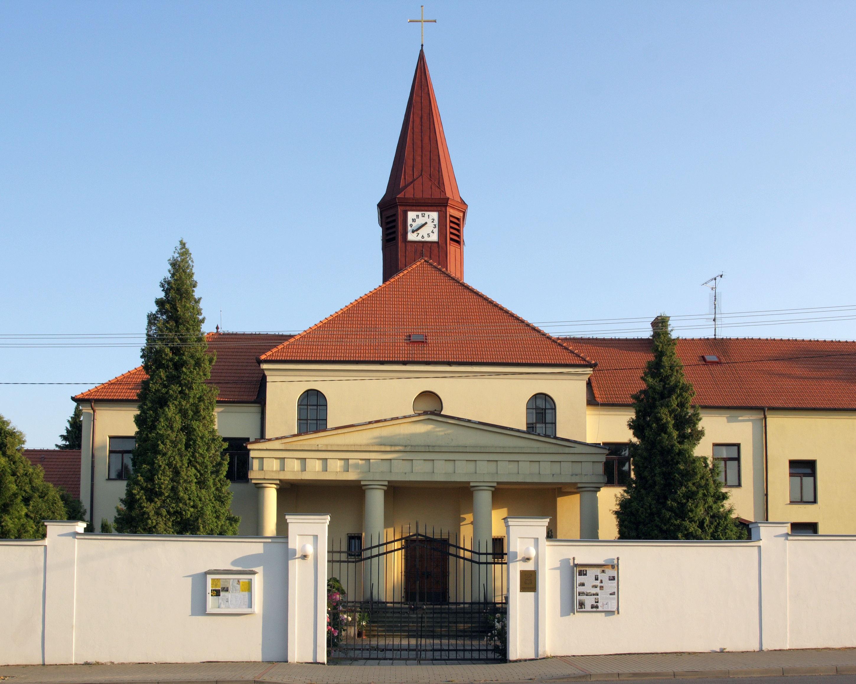 Rajhrad - Kostel Božského srdce Páně.